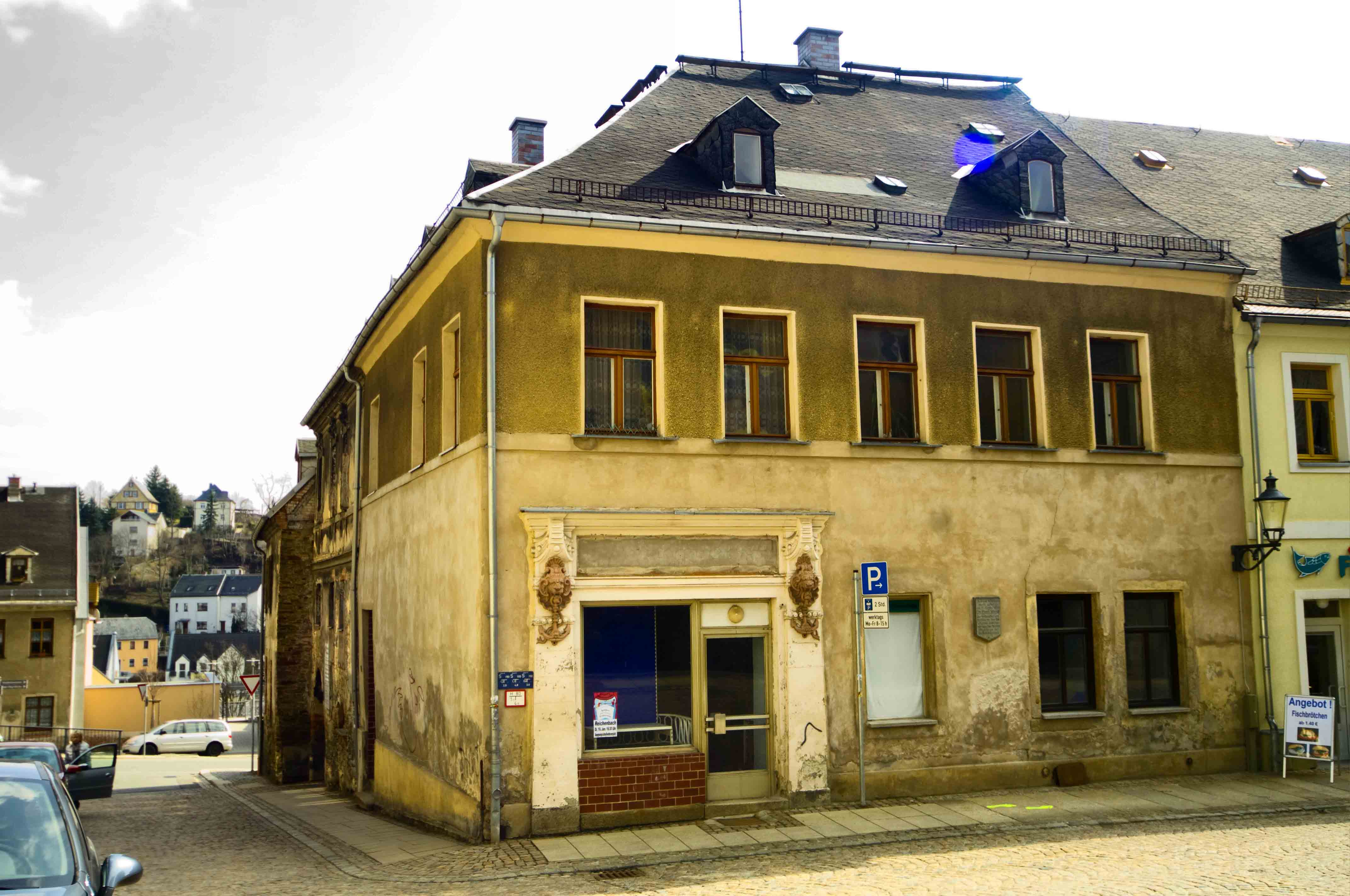 Geburtshaus des Otto Eduard Schmidt in der Langen Reihe in Reichenbach im Vogtland